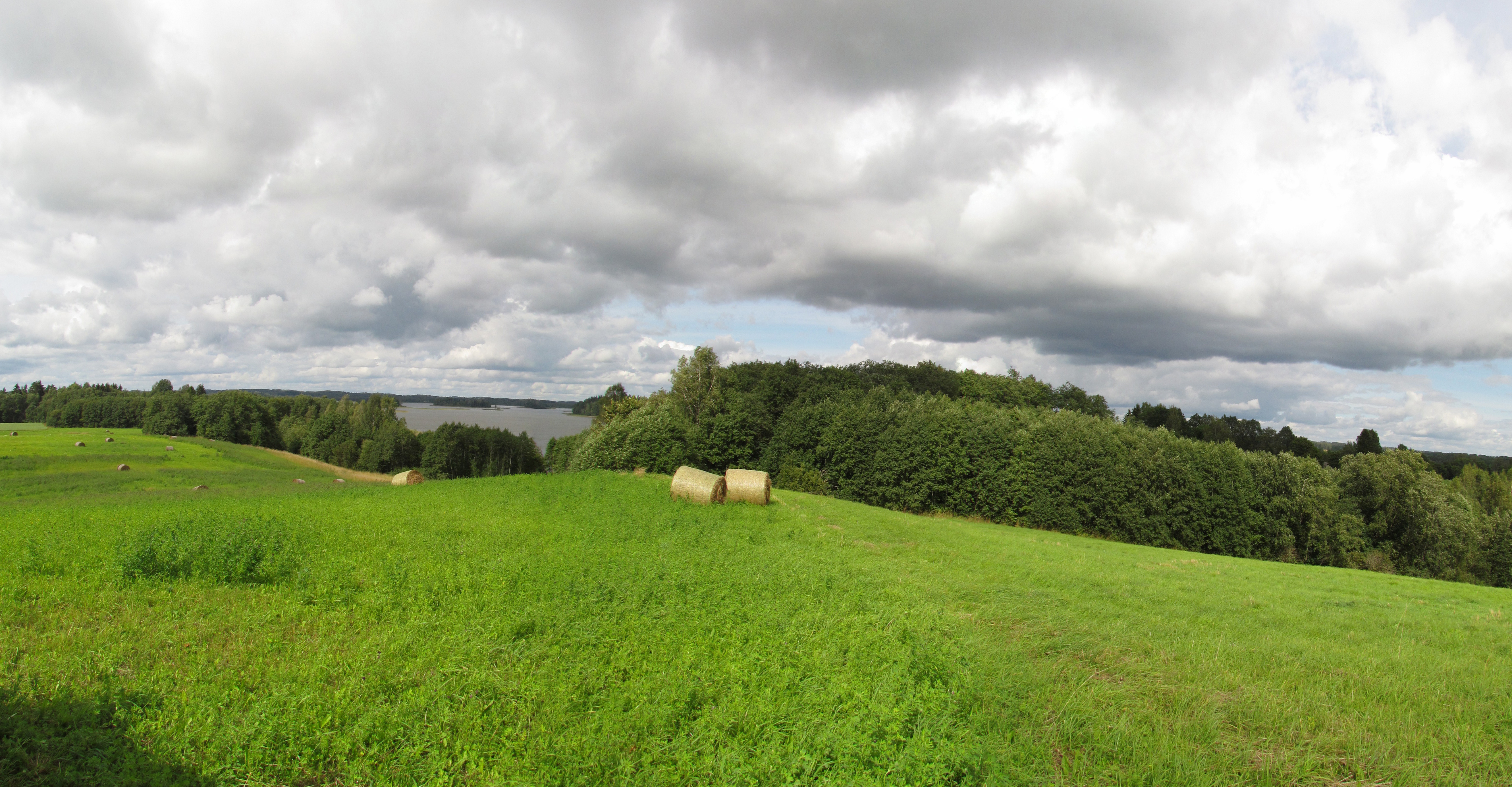 Inesis no kalna